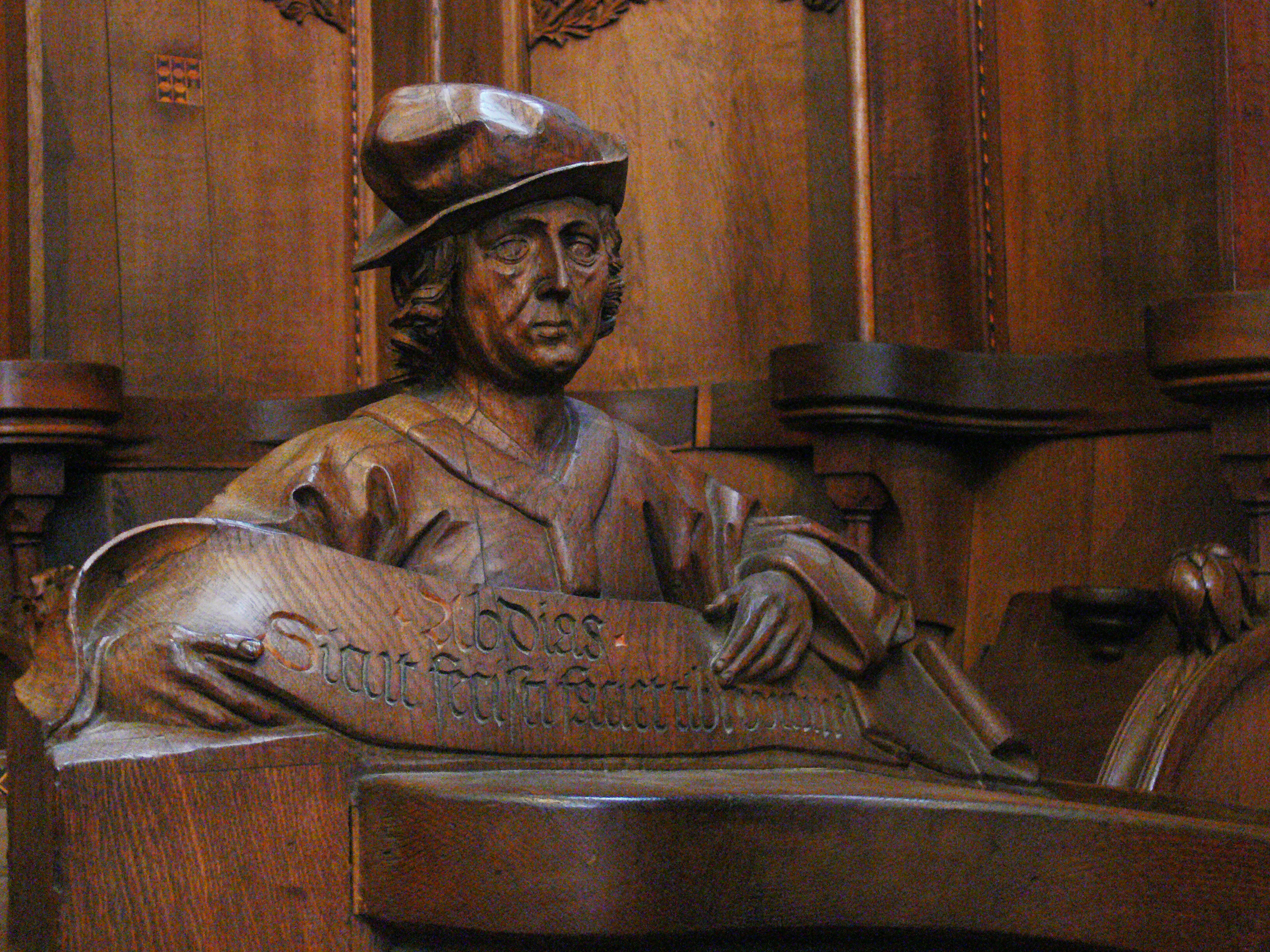 Kloster Blaubeuren, Chorgestühl: Prophet Obadja